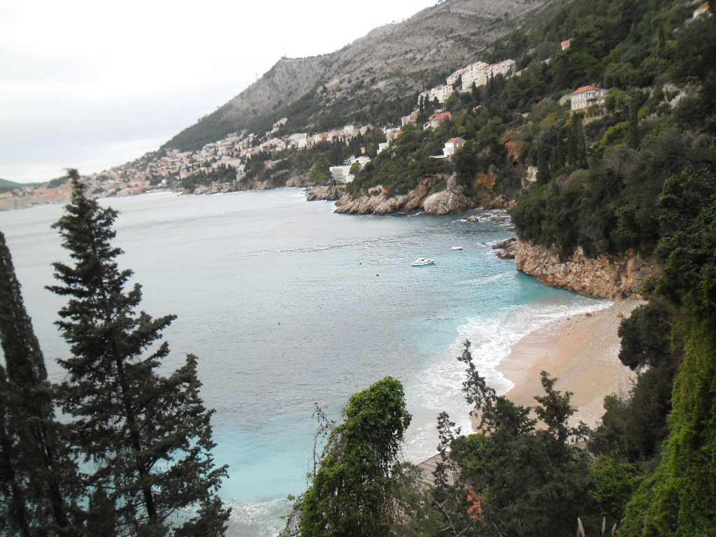 pogled sa sv. Jakova